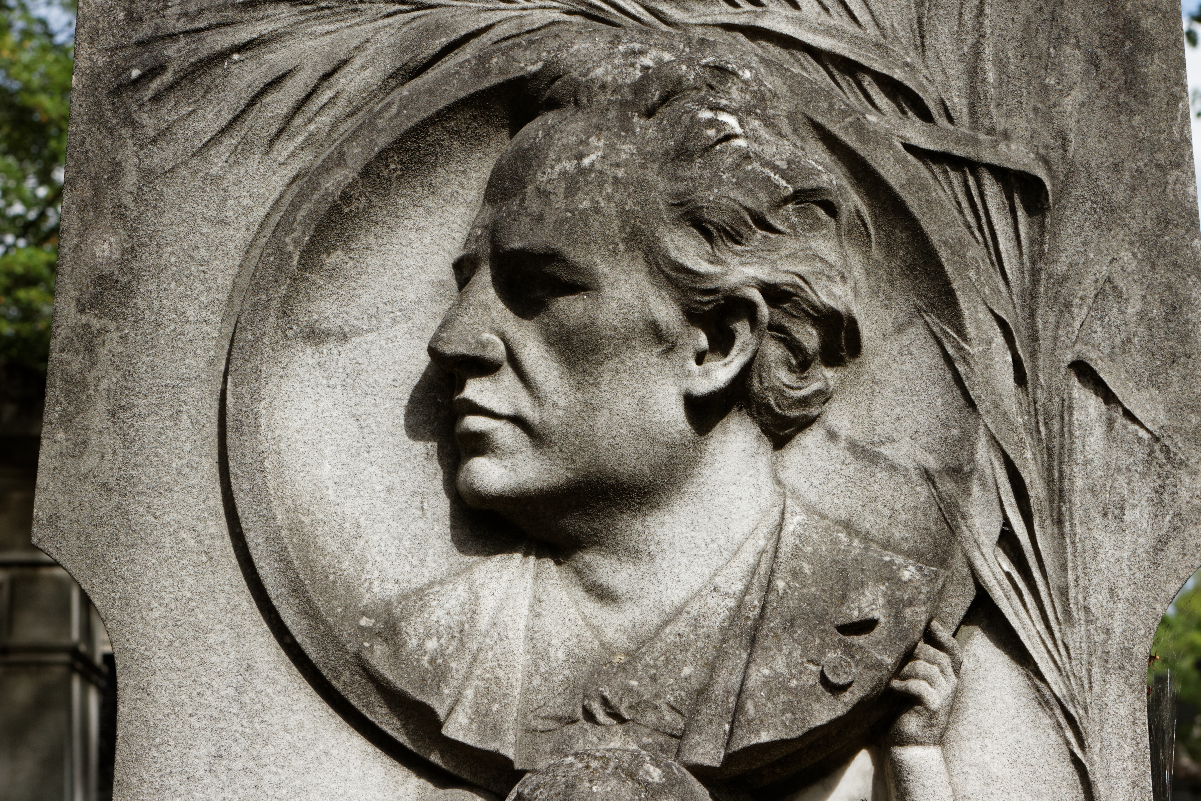 Sépulture du compositeur de musique Georges Lamothe (1842-1894). « Stèle en marbre blanc. Dans la face antérieure est sculpté un médaillon soutenu par un enfant. Au bas, fleurs et banderole sur laquelle est gravé : « À mon cher mari. » Signé : H. Allouard, 1895. » (Jouin, 1897)